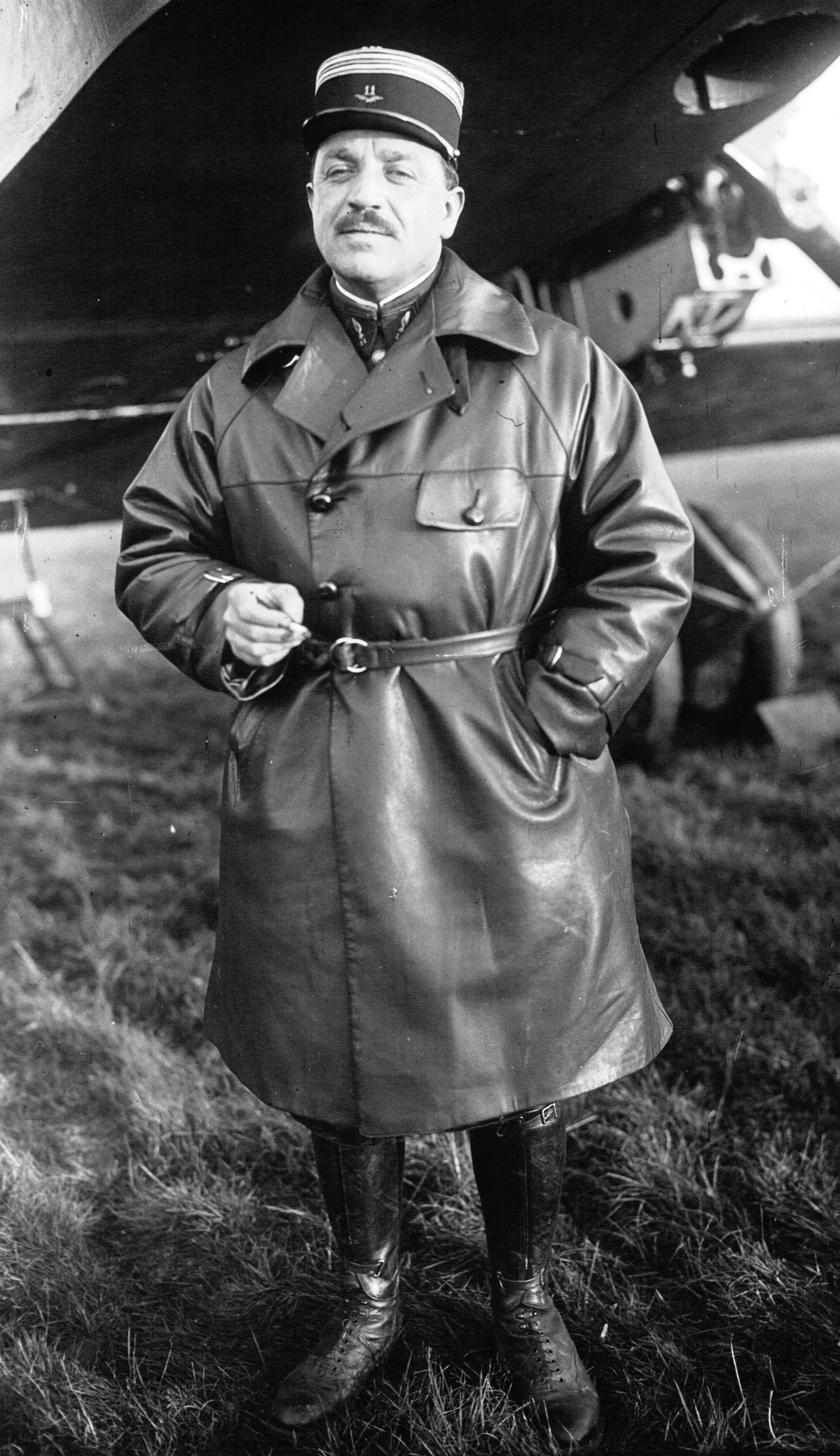 Le raid aéronautique trans-africain Paris-Lac Tchad : le Colonel Vuillemin (portrait à 2 m 50).